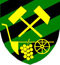 Znak města Zbýšova v okrese Brno-venkov